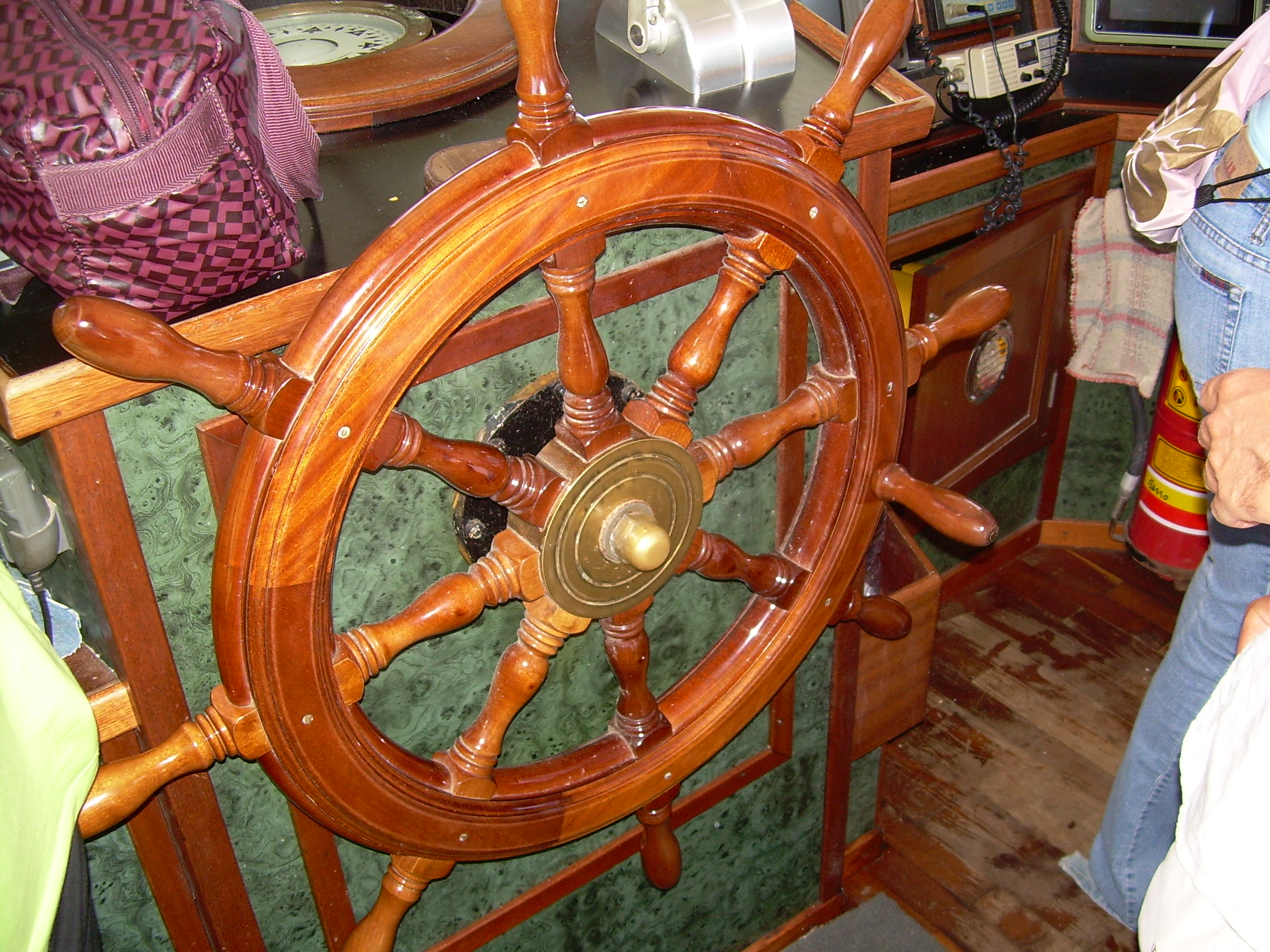 Foto di un timone